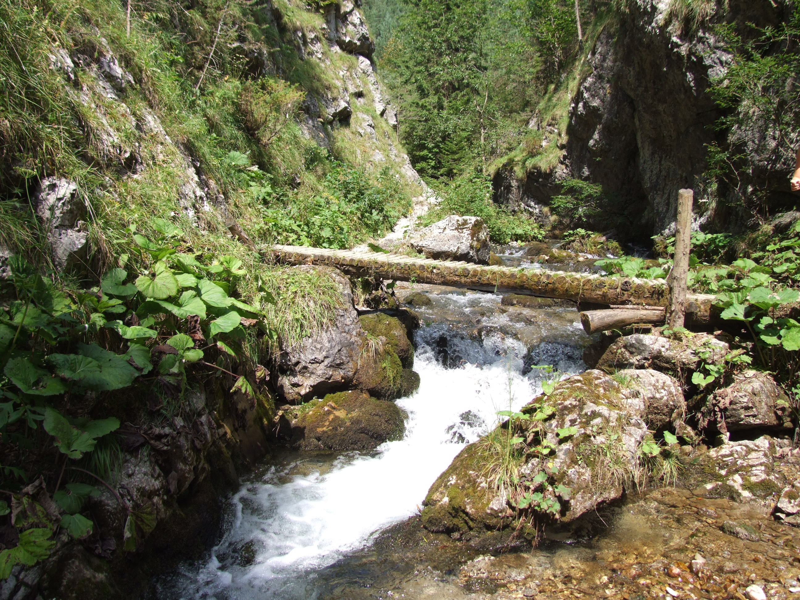 Prosiecka dolina. Przejście przez Prosiecki Potok